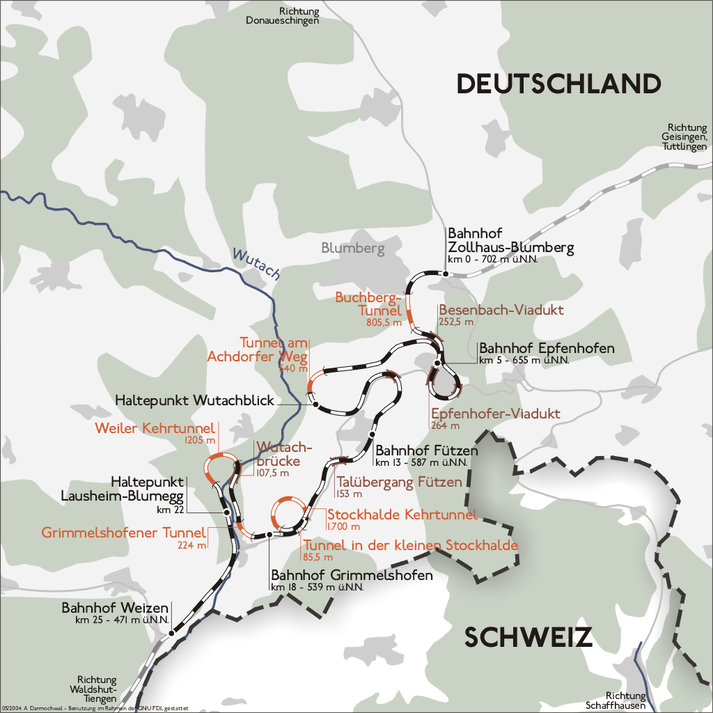 Darstellung zeigt die Streckenführung der Wutachtalbahn. Zeichnung erstellt 2004 von Benutzer:Sansculotte. Bild ist unter der Creative Commons Share Alike zur weiteren Verwendung freigegeben. Quellenangabe und Beleg an erbeten.